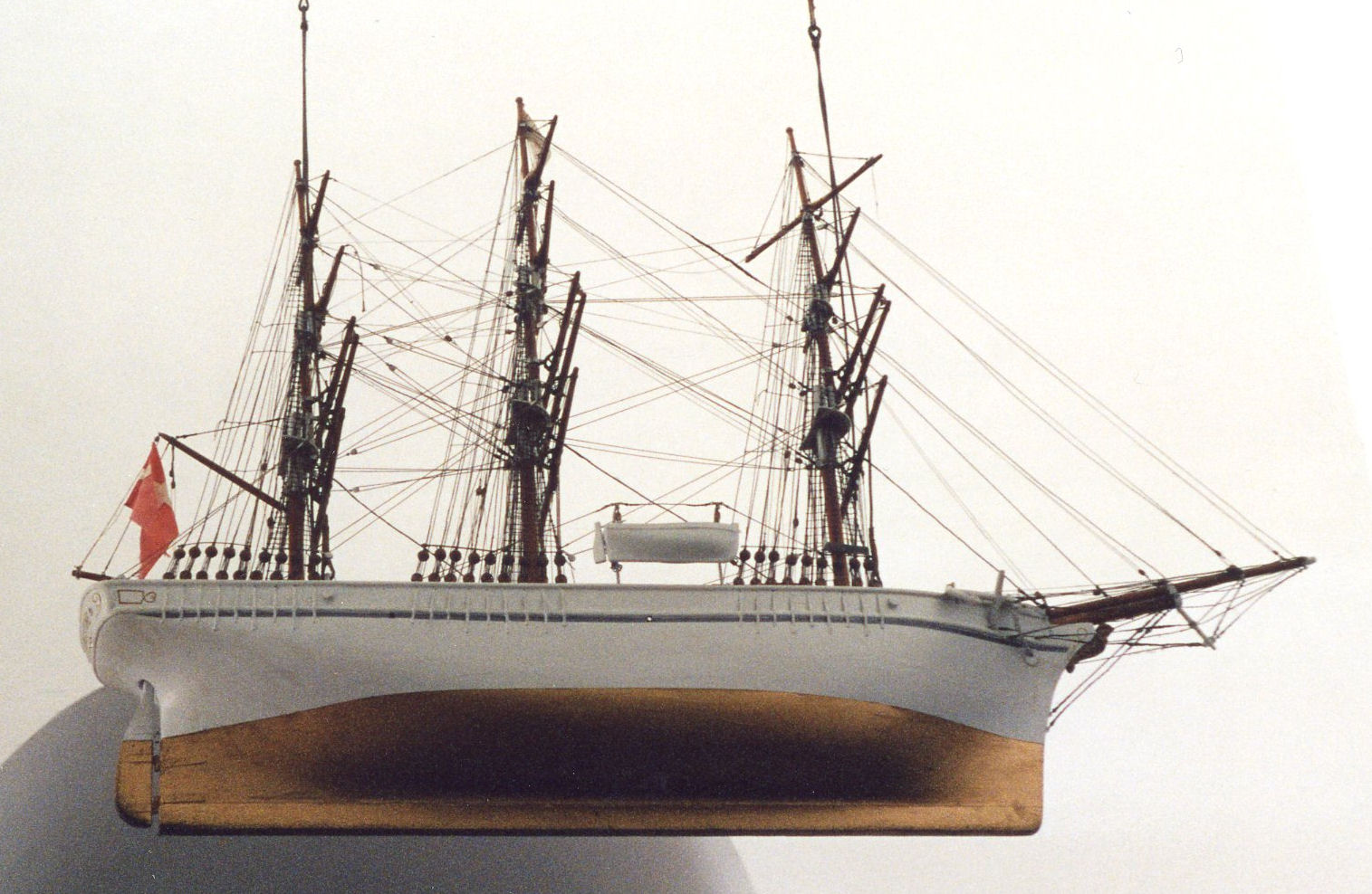 "Livingstone" i Christians Kirke